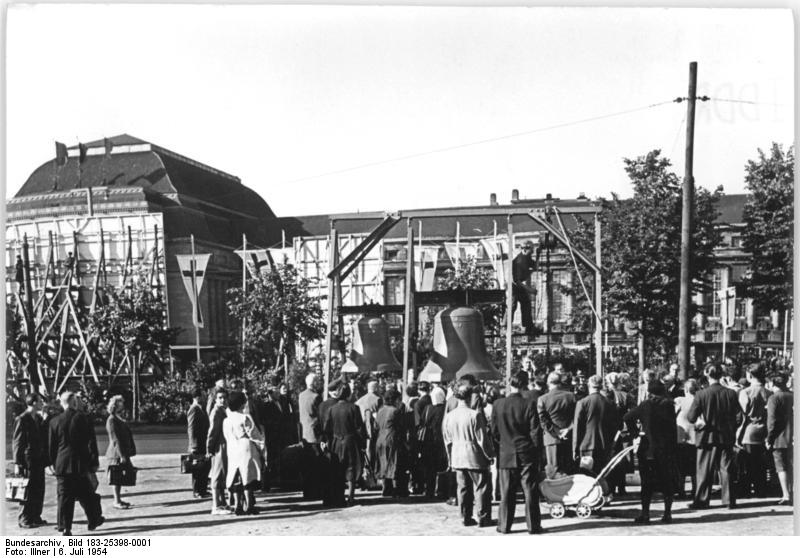 Leipzig, Hauptbahnhof, Glocken Zentralbild Illner Be-Sch 3 Motive 6.7.1954 Deutscher Evangelischer Kirchentag in Leipzig vom 7.4. bis 11.4.1954 UBz: Vor dem Leipziger Hauptbahnhof werden drei Glocken angebracht, die zum Kirchentag läuten werden.